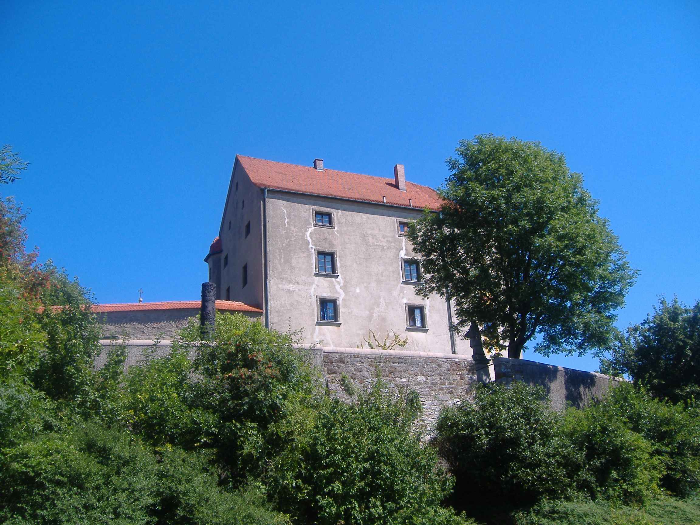 Westfront Burg Spielberg